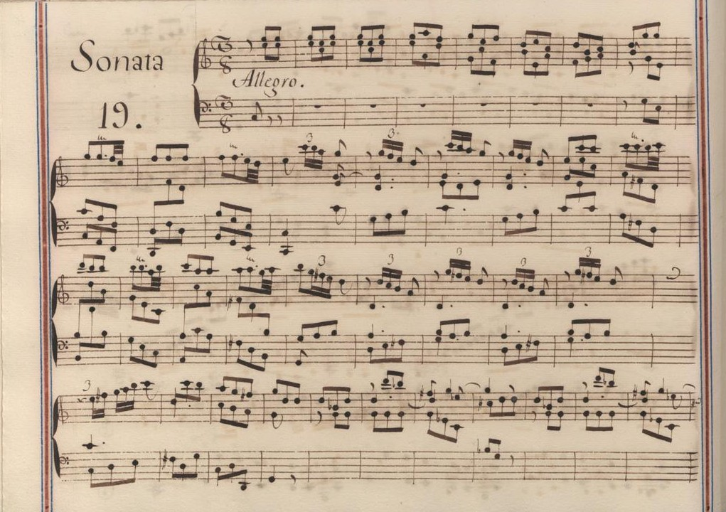 La sonate K. 502, telle qu'elle se présente dans le manuscrit de Venise, volume XII no. 19.